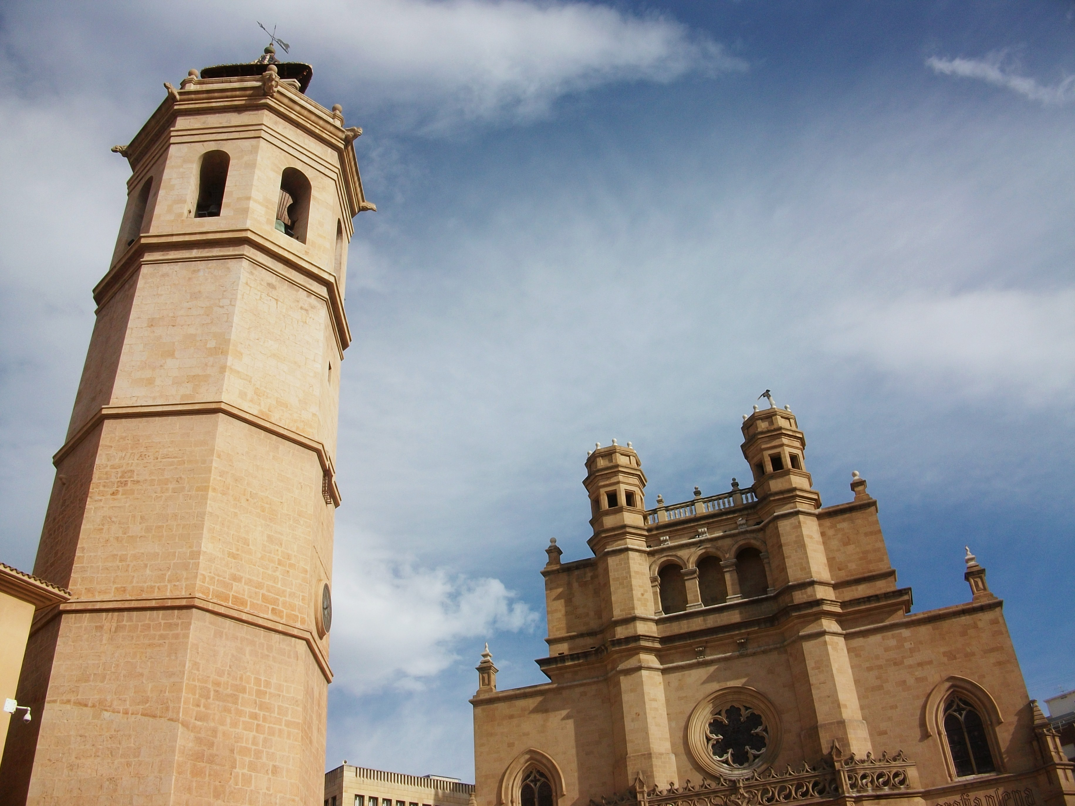 Fadrí i cocatedral de santa Maria de Castelló.